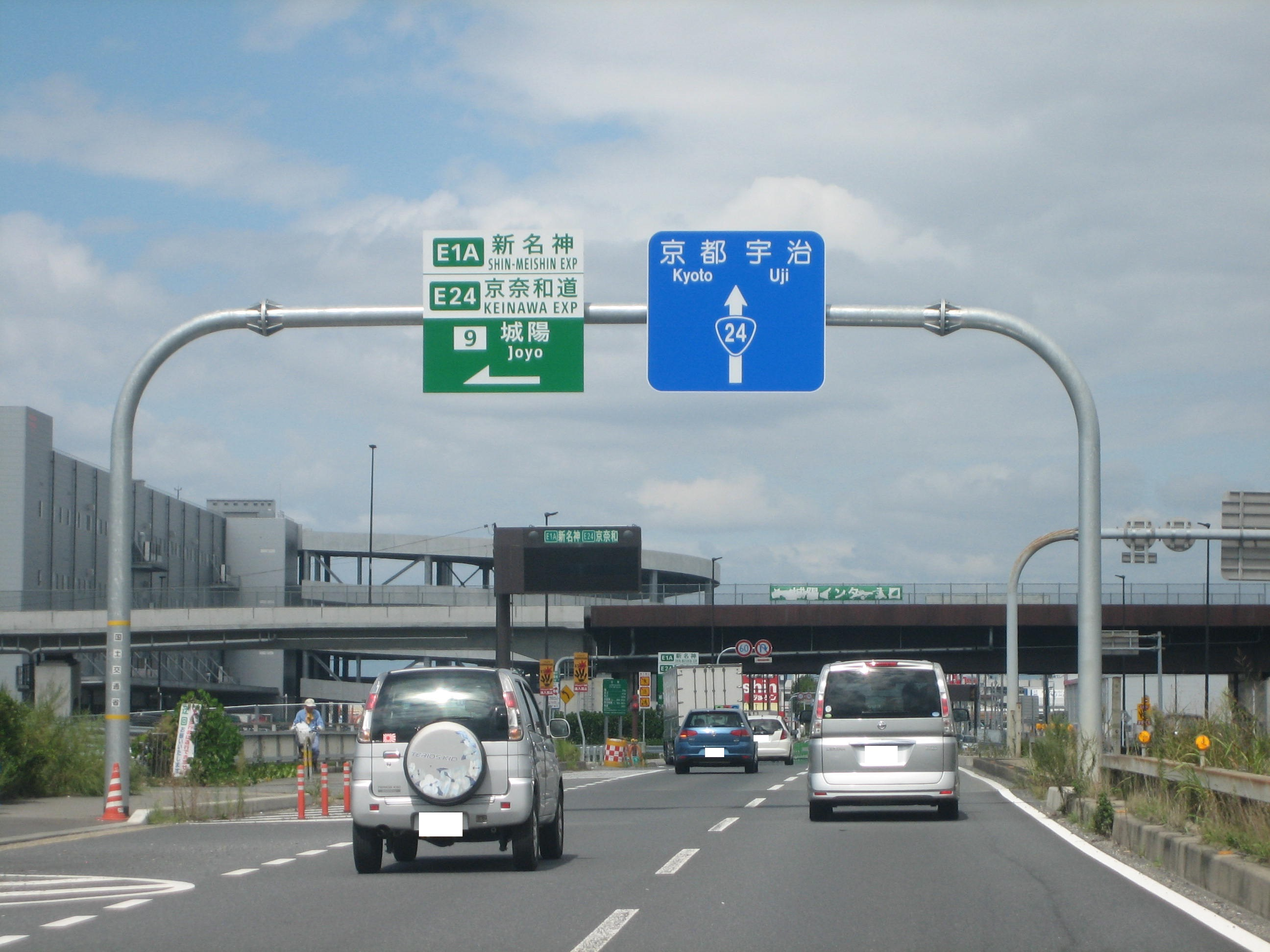 城陽IC入口。